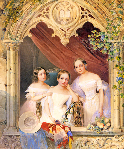 Дочери великого князя Михаила Павловича и великой княгини Елены Павловны — Екатерина (1827-1894), Елизавета (1826-1846) и Мария (1825-1846).